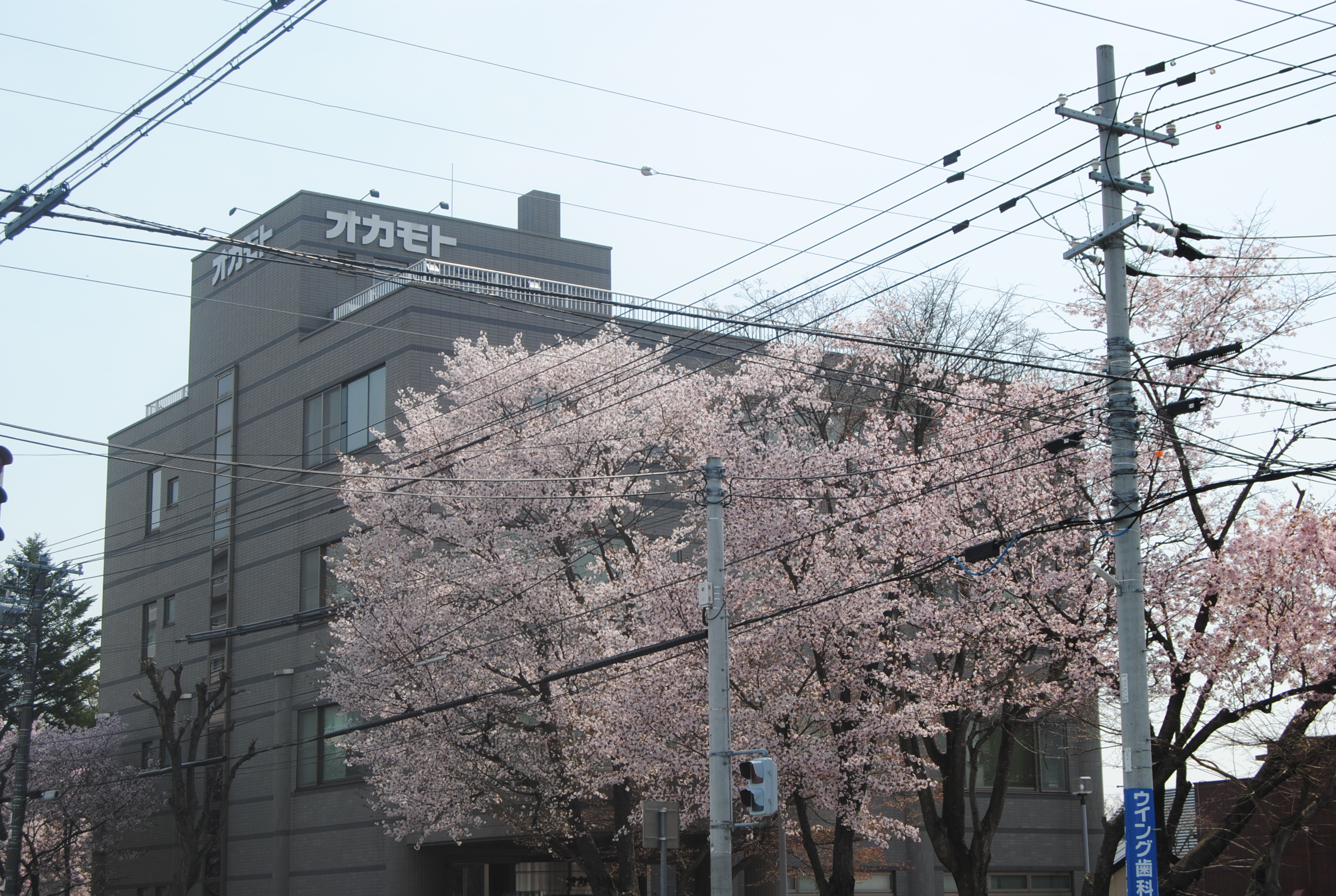 オカモトグループの本社